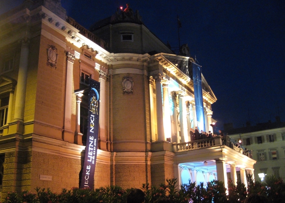 Riječke ljetne noći 2009. godine